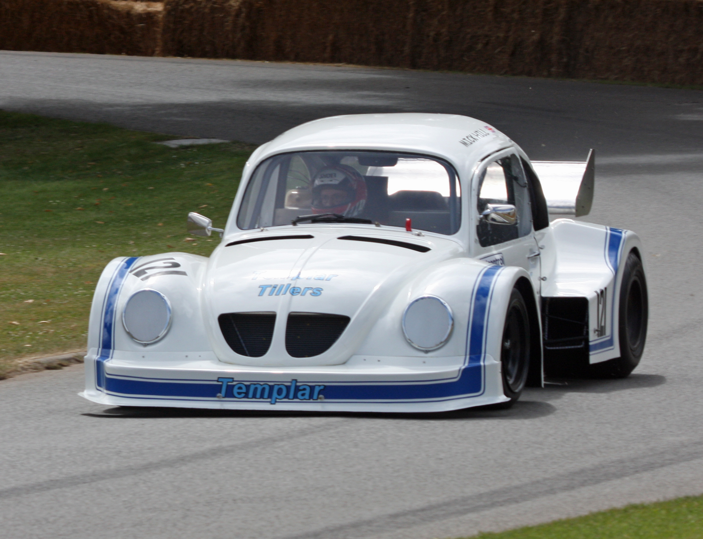 1976 Volkswagen-Chevrolet Beetle 5 litre V8